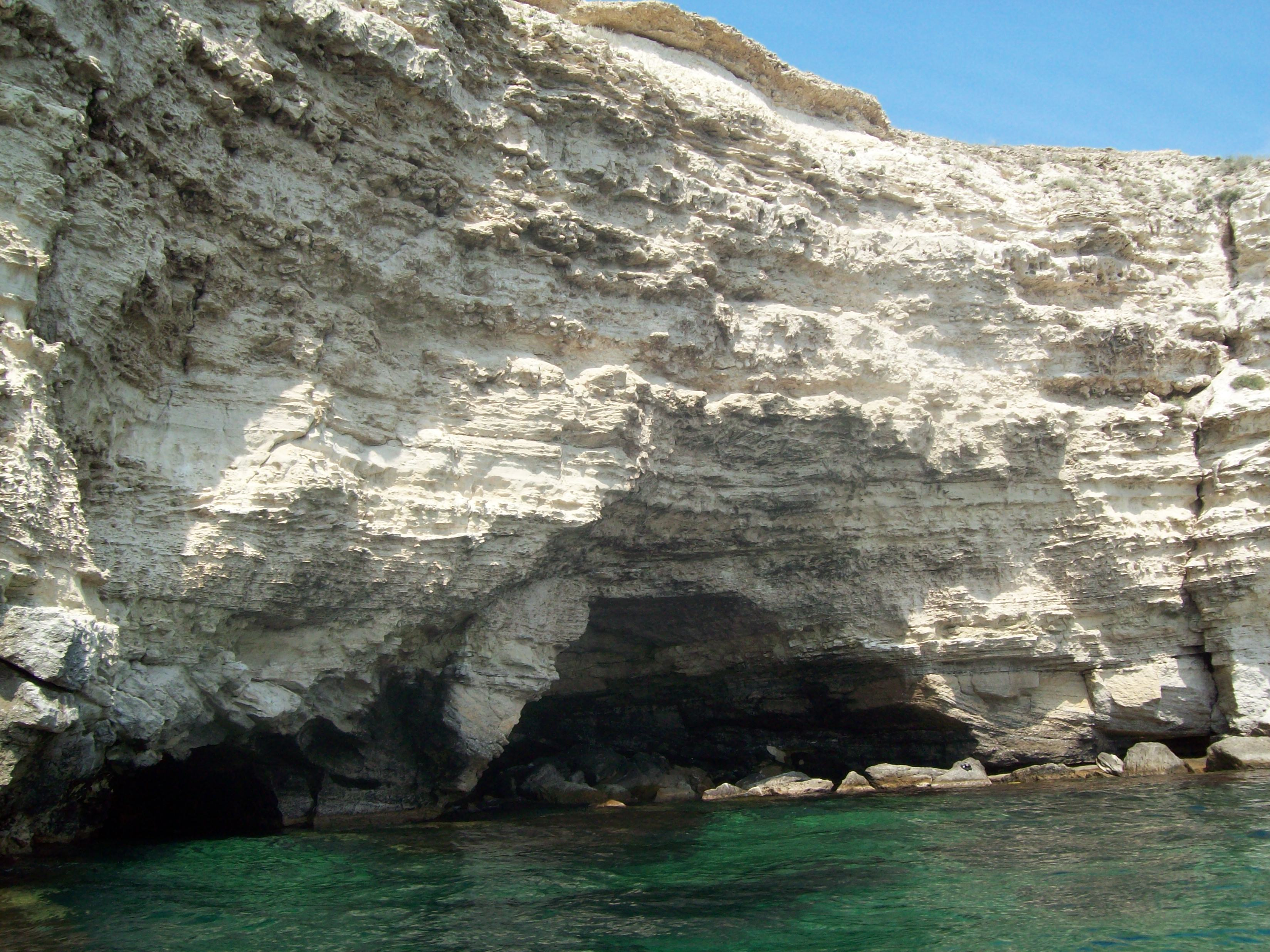 Україна, Кримський півострів, 2013. Тут дуже гарно, але біля скель небезпечно і, майже завжди, дуже холодна вода